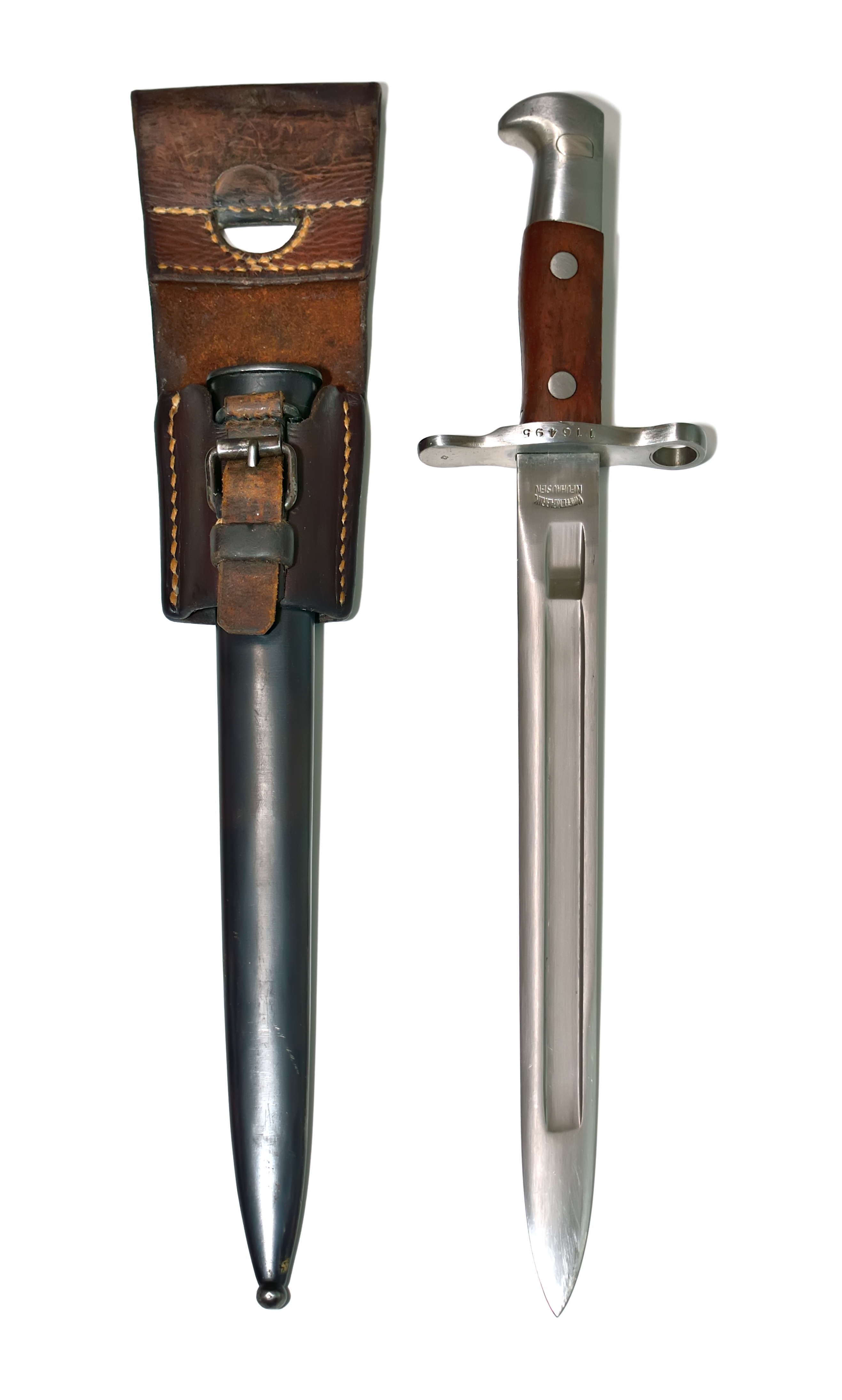 Baïonnette suisse modèle 1899